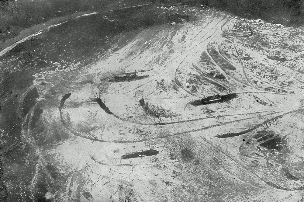 Der Flottenverband vor Hangö, Anlandung der „Ostsee-Division“ in Hangö.